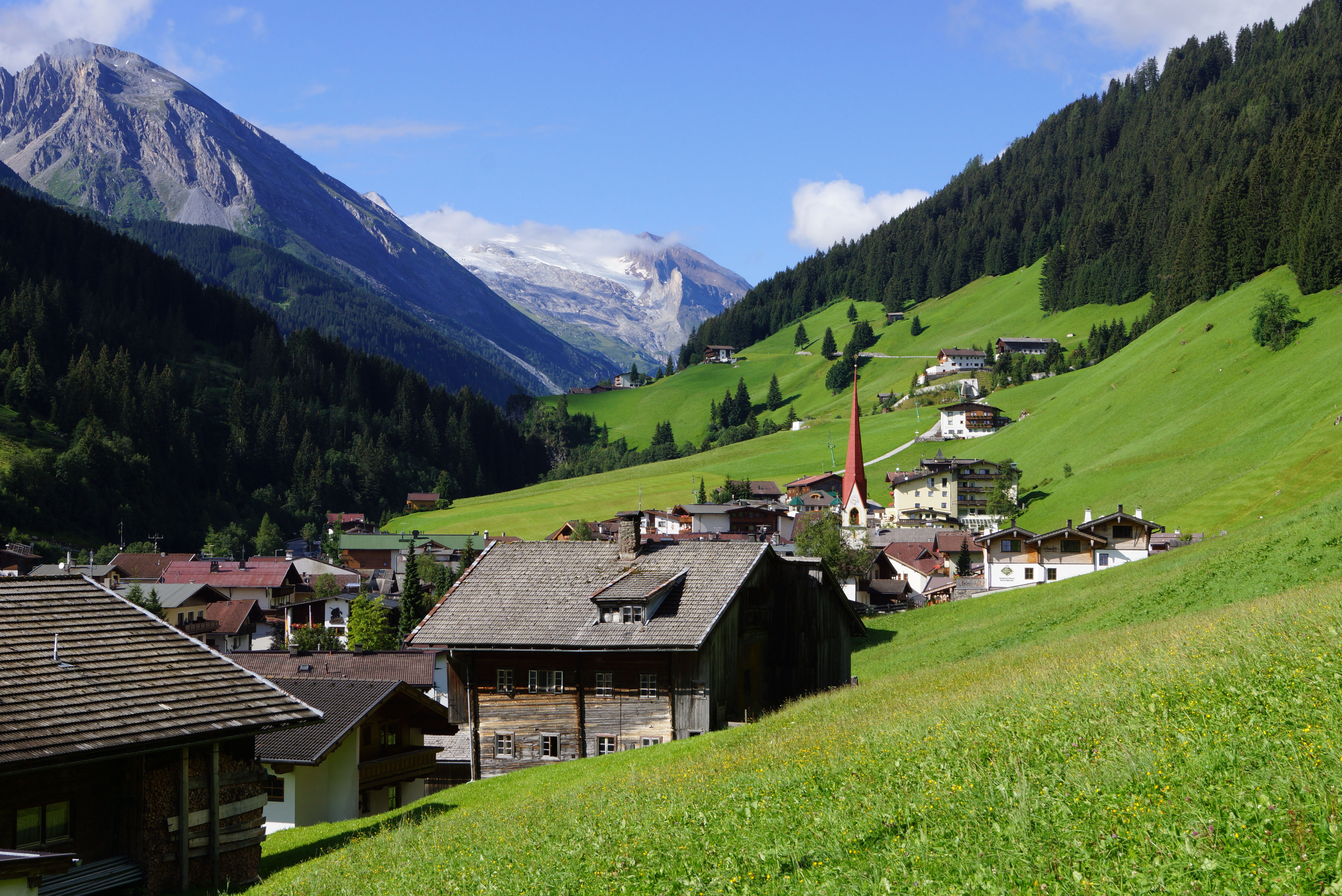 Tuxertal: Wir schauen von Lanersbach (Ortsrand nahe Seilbahn-Talstation auf 1.290 m) talein in südwestlicher Richtung zum Hintertuxer Gletscher. Diese Talseite (orografisch links) gehört zu den Tuxer, die jenseitige zu den Zillertaler Alpen.